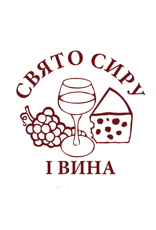 Logo des „Käse- und Weinfestivals“ in Lemberg (Lwiw)